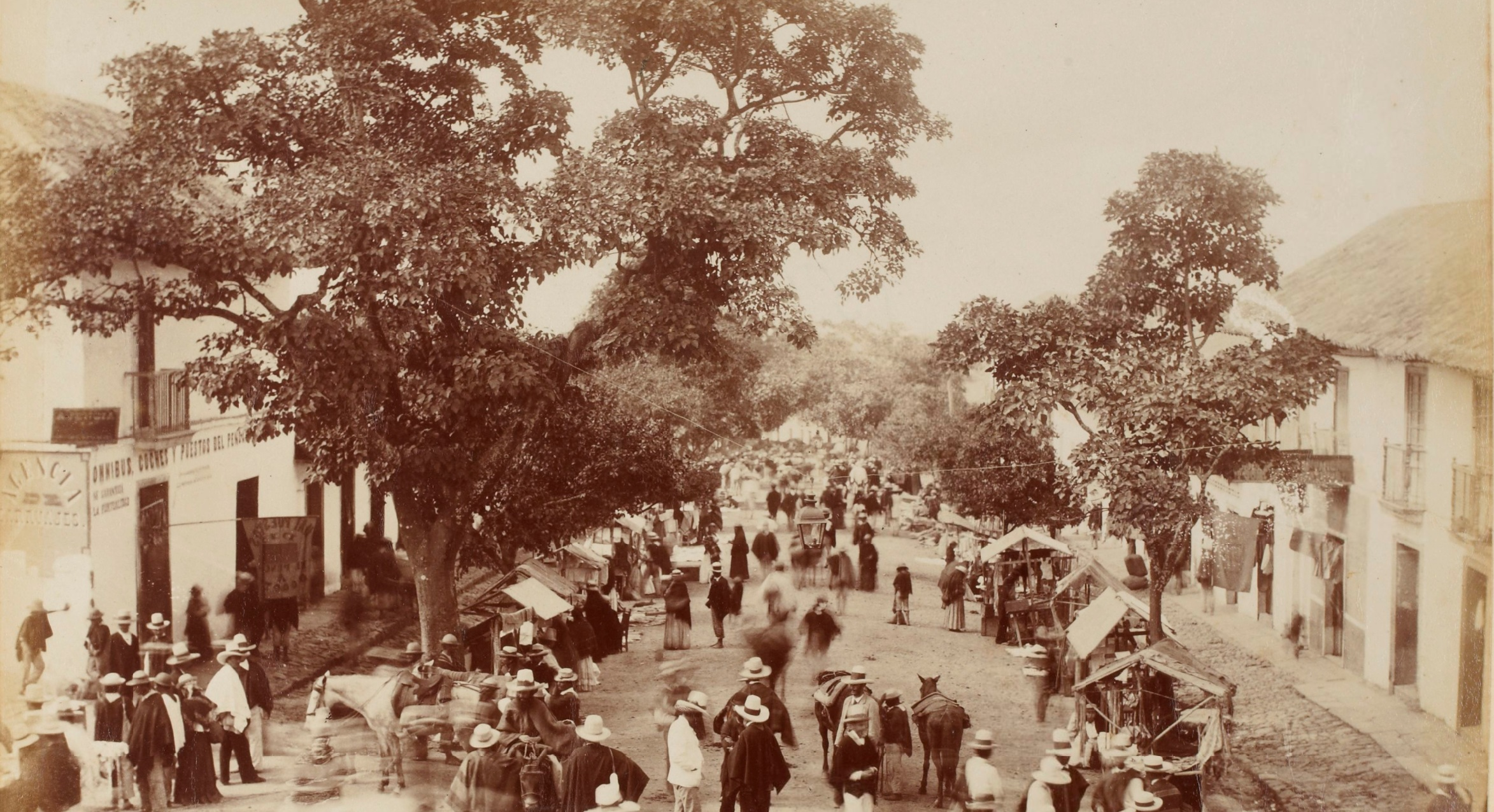 Jour de marché à La Mesa, Cundinamarca, Colombie